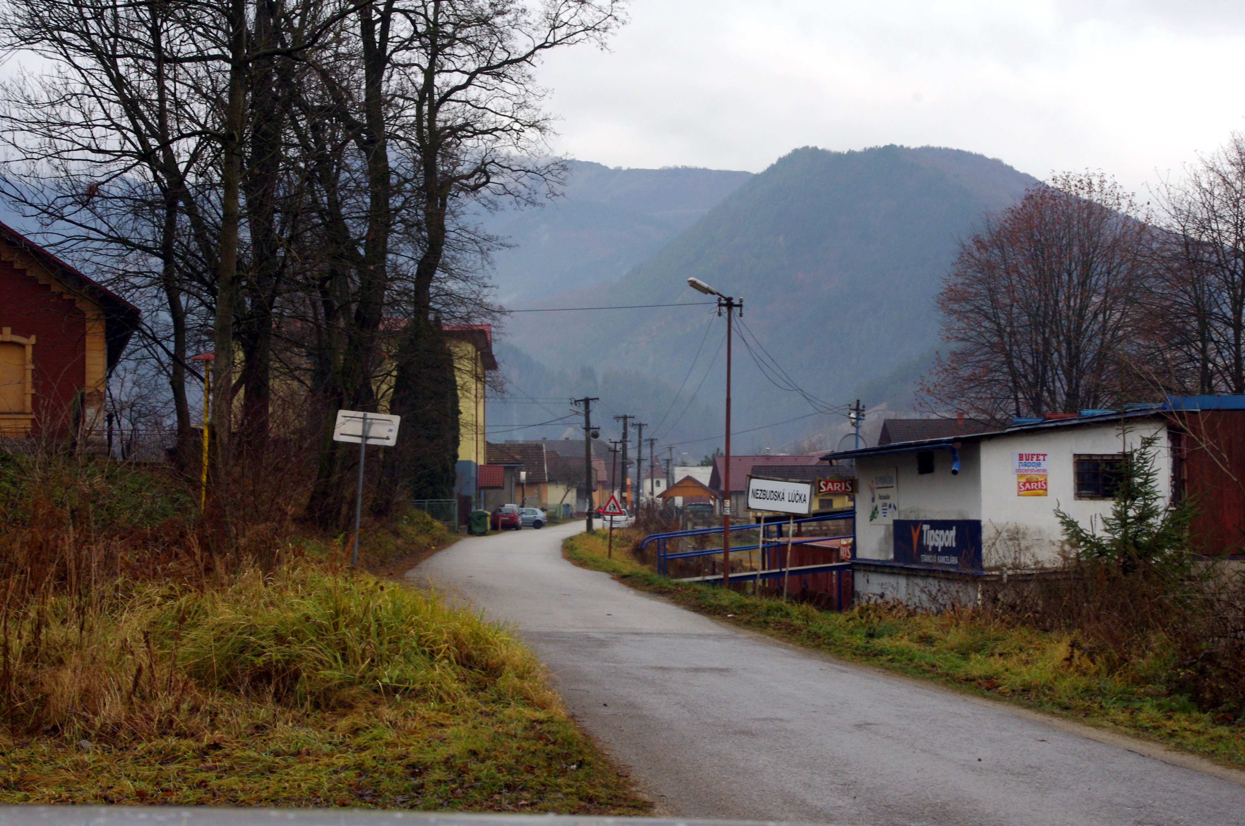 Nezbudská Lúčka 05.12.2011